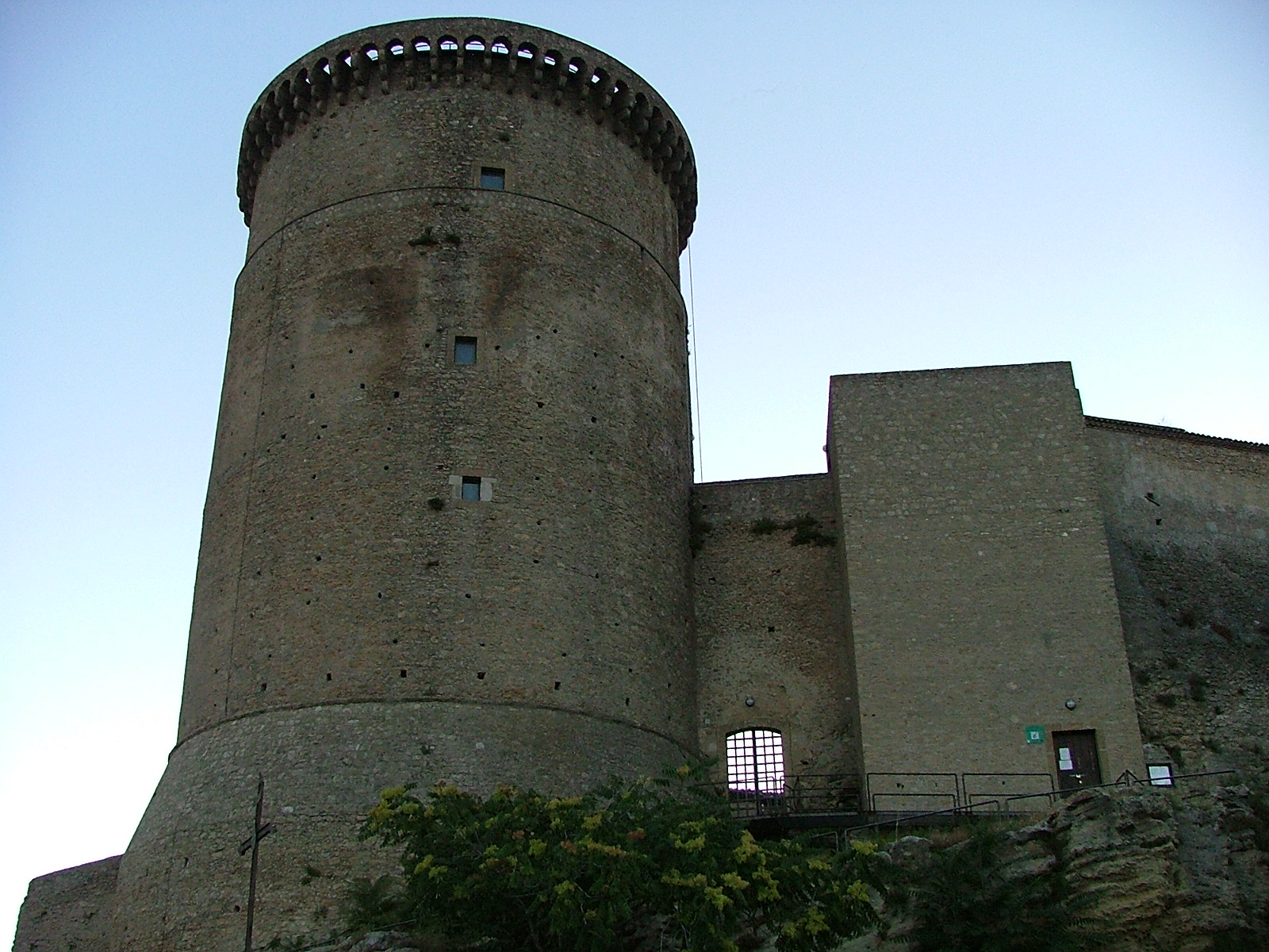 Torre normanna con visuale sulla torre quadrangolare del castello. Rocco Stasi, fatta da me, sono l'autore GFDL, sono l'autore